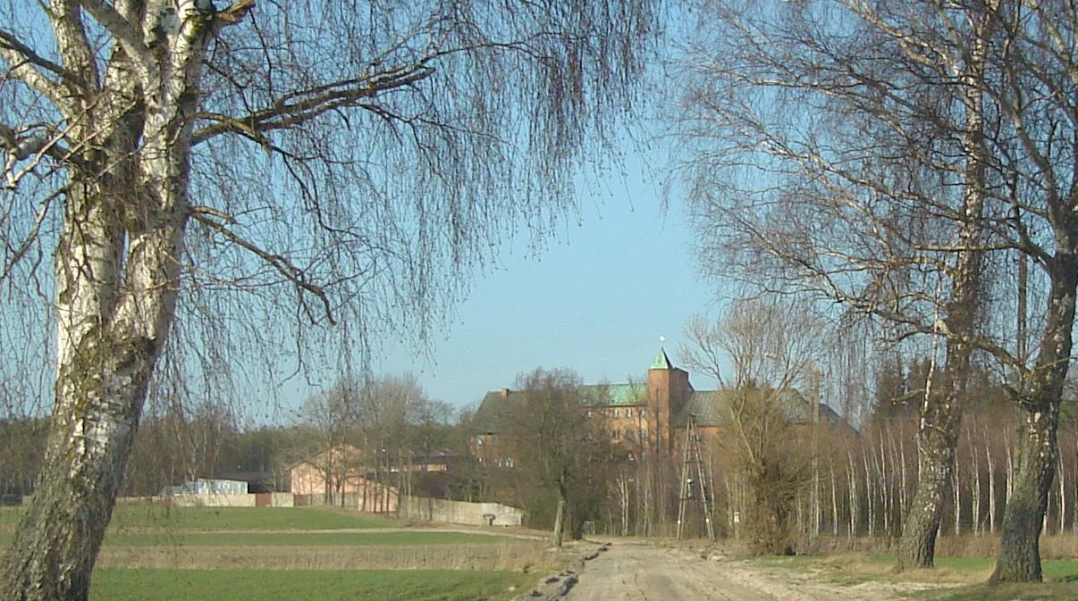 Orlik - widok na klasztor Orlik-klasztor.jpg przycięty